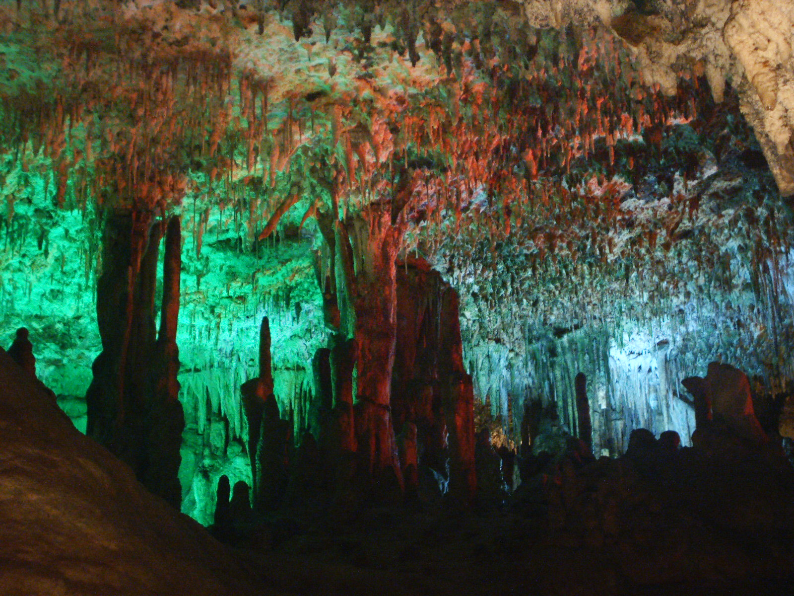 Cueva de Hams, en Porto Cristo, isla de Mallorca,Islas Baleares